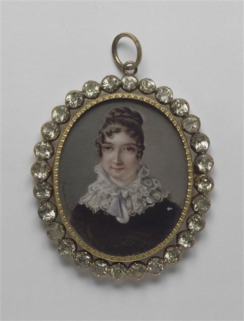 Stéphanie Beauharnais de Bade, 45 x 37 cm, Malmaison, Francia